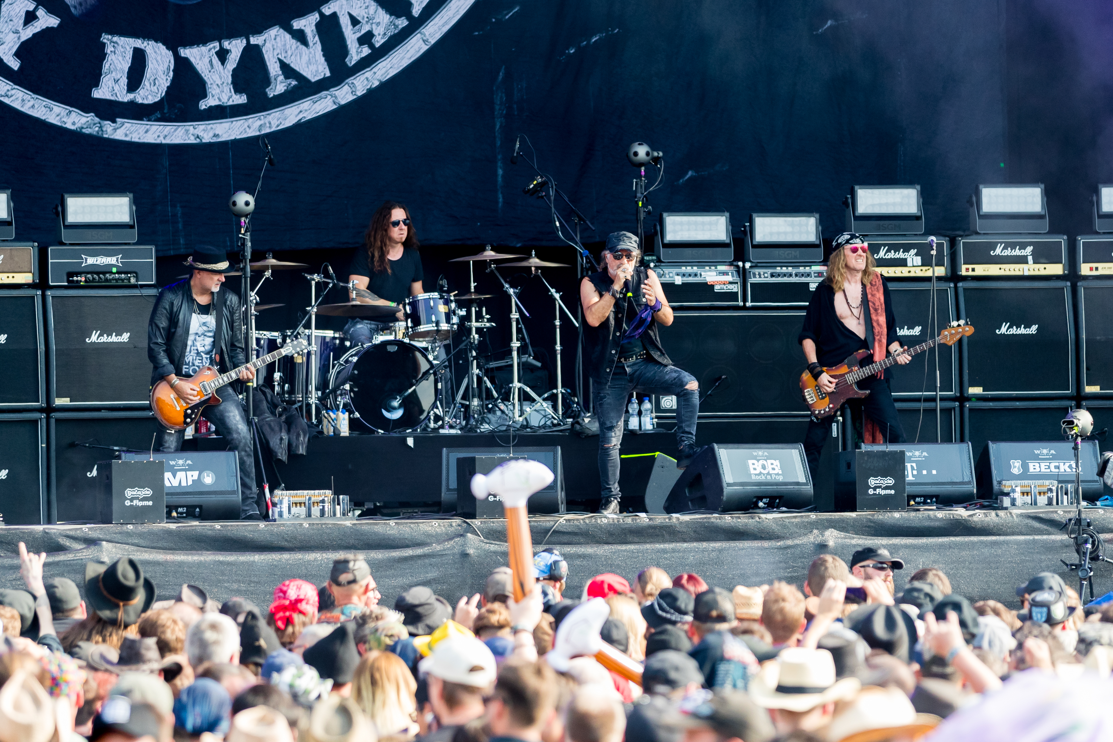 Krokus during Wacken Open Air at The Holy Wacken Land, Wacken, Schleswig-Holstein, Germany on 2019-08-01, Photo: Sven Mandel